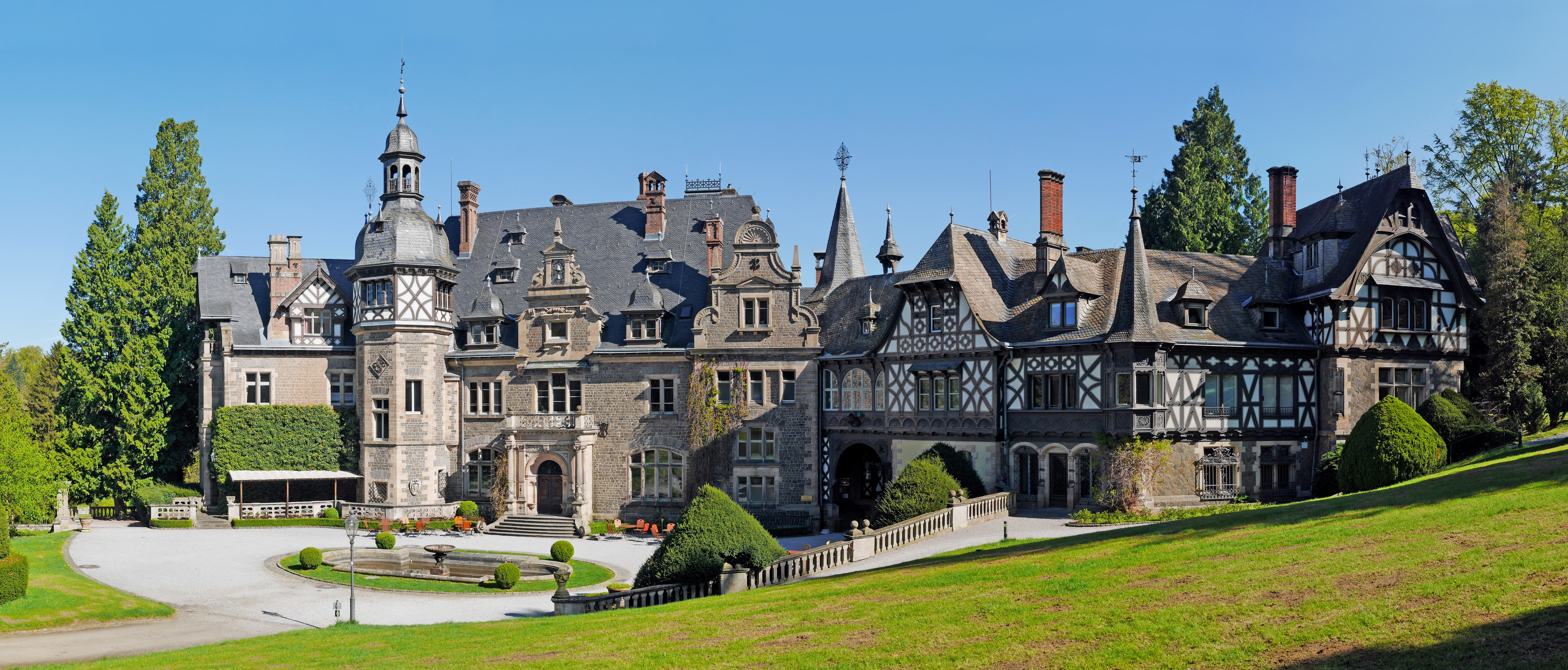 Das Schloss Rauischholzhausen ist ein schlossartiger Herrensitz am südwestlichen Ortsrand von Rauischholzhausen in Hessen. Das Schloss wurde in den Jahren 1871 bis 1876 erbaut und ist vom zeitgleich angelegten, 32 Hektar großen Schlosspark Rauischholzhausen, ein Englischer Landschaftsgarten umgeben. Diese Datei wurde mit Hugin erstellt